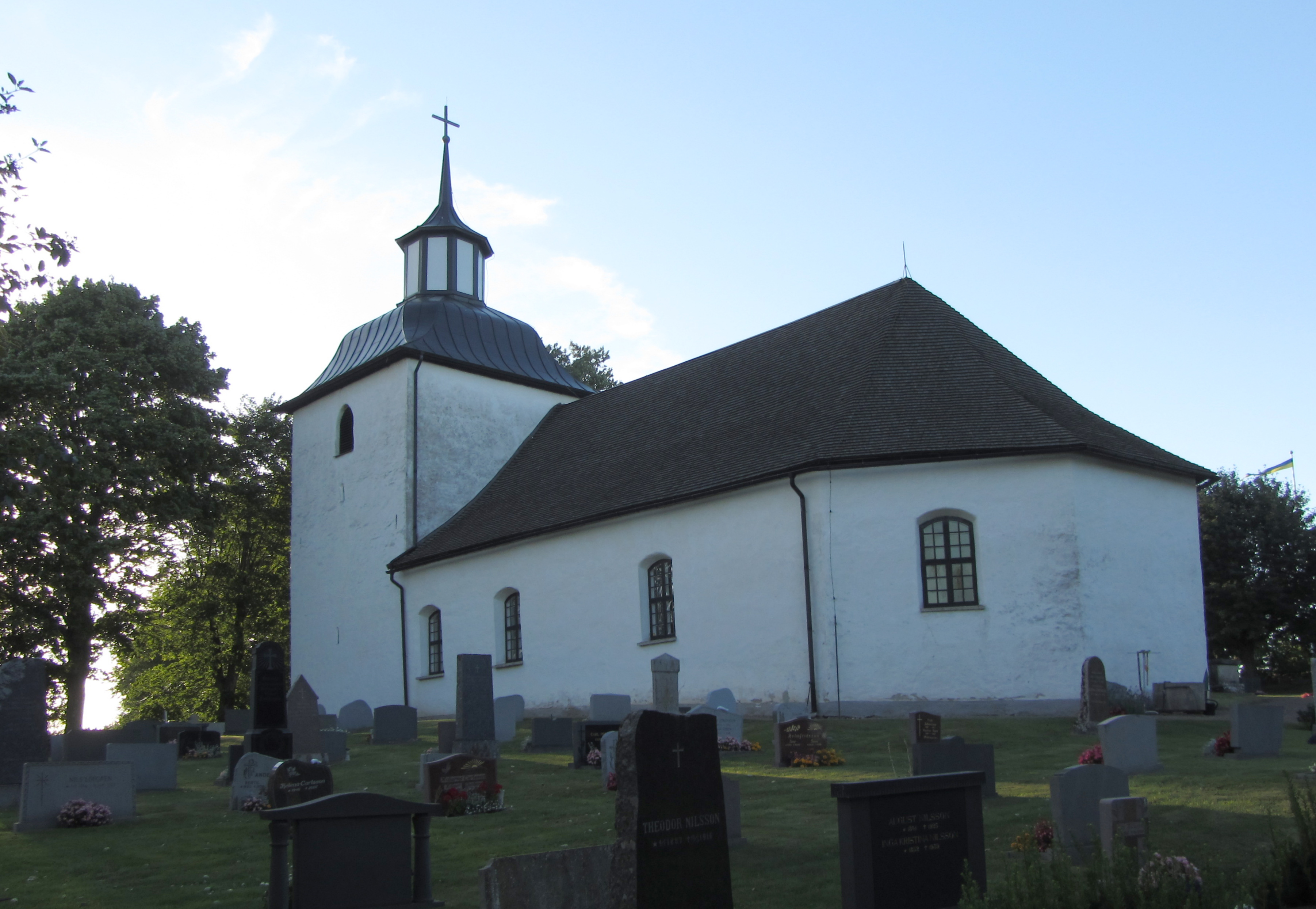 Odensåkers kyrka och kyrkogård. Kyrkan och kyrkogården ligger väster om sjön Östen i södra Vadsbo härad i nordöstra Västergötland